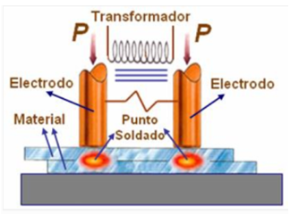 Esquema amb les parts d'una soldadura unilateral